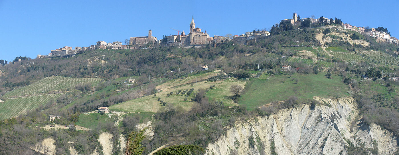 Ripatransone, Marche, ItaliaRipatransone (Provincia di Ascoli Piceno, Regione Marche).